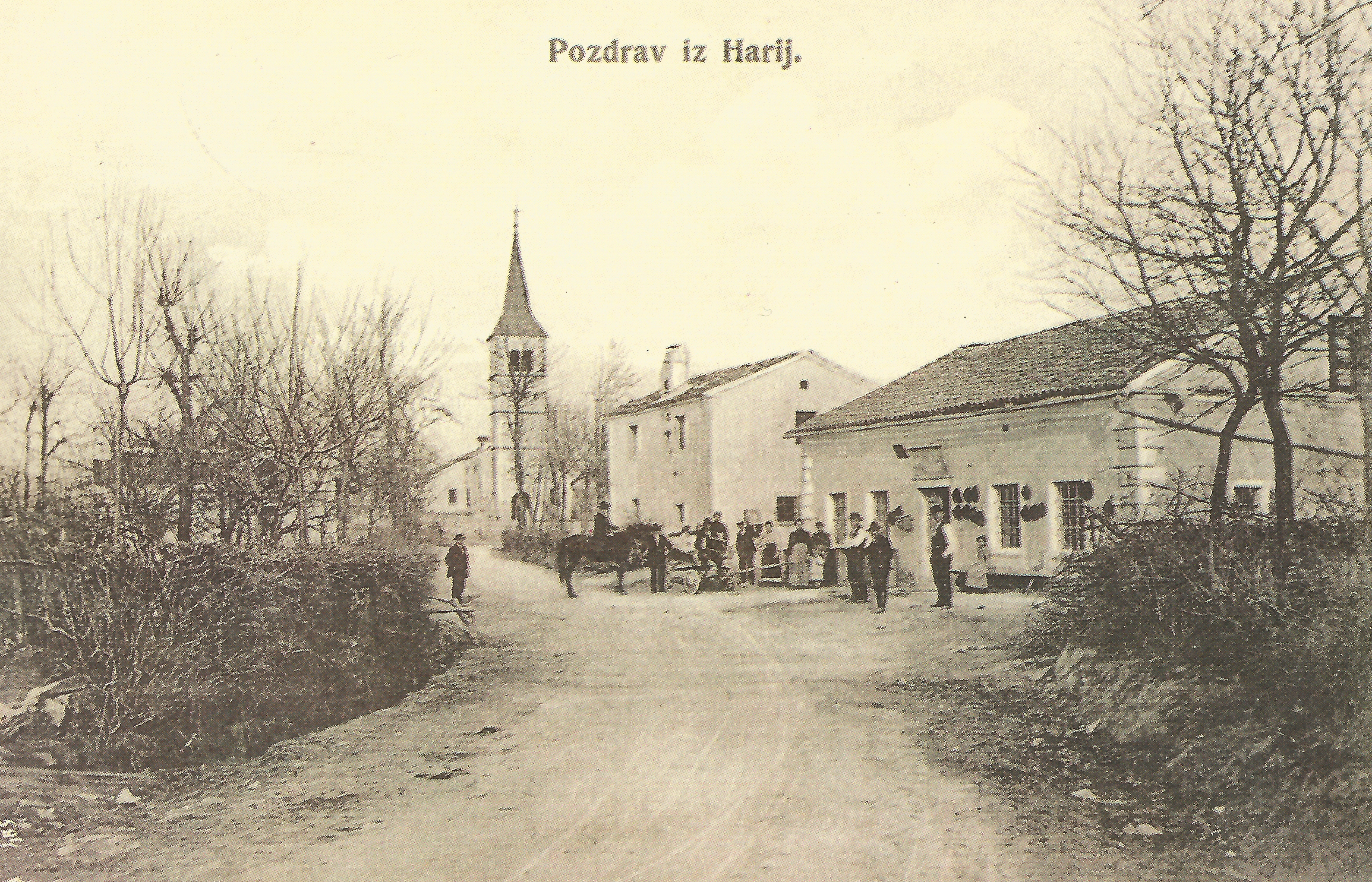 Razglednica Harij.